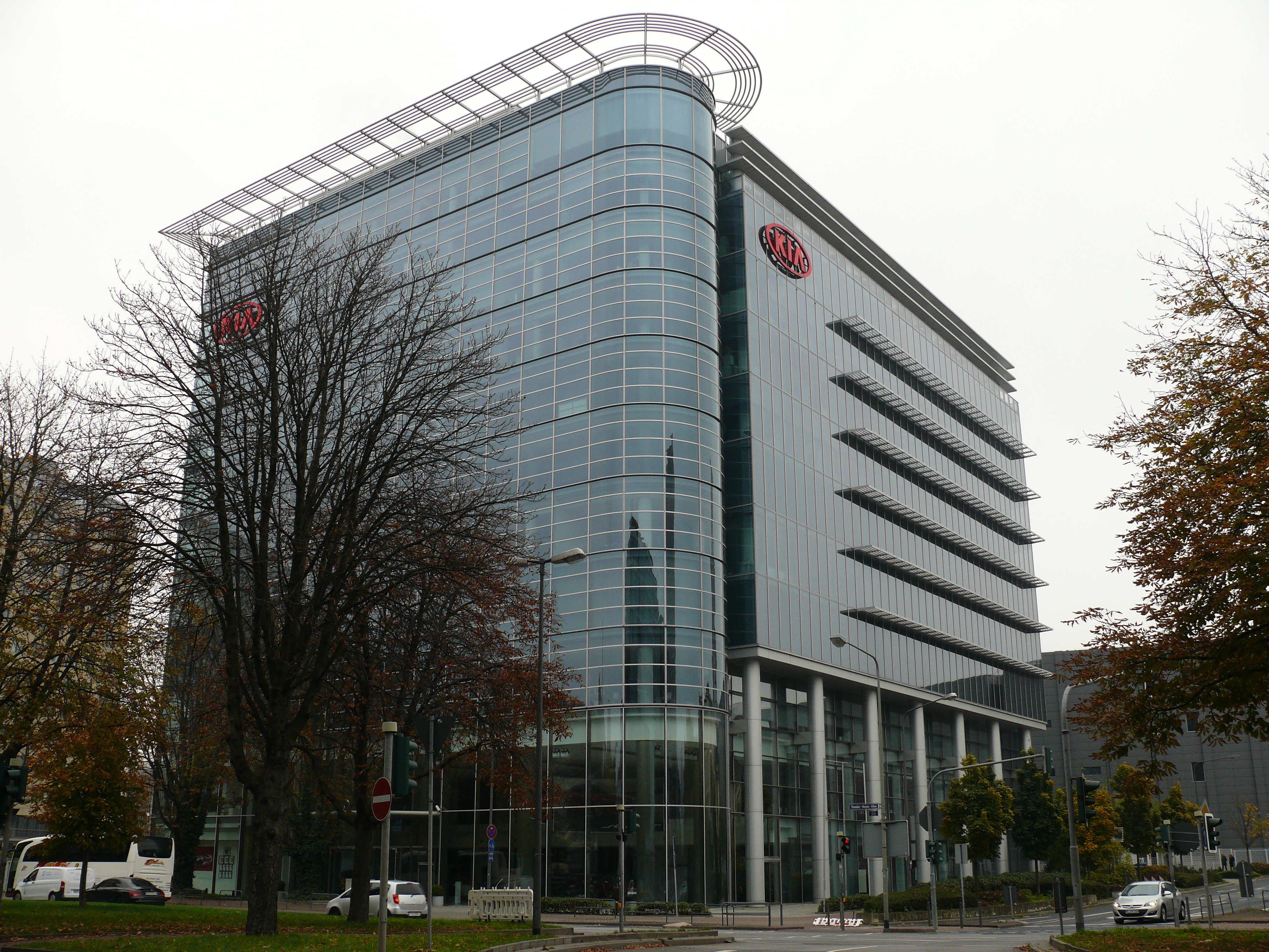 Das Gebäude der Kia Zentrale in Frankfurt.